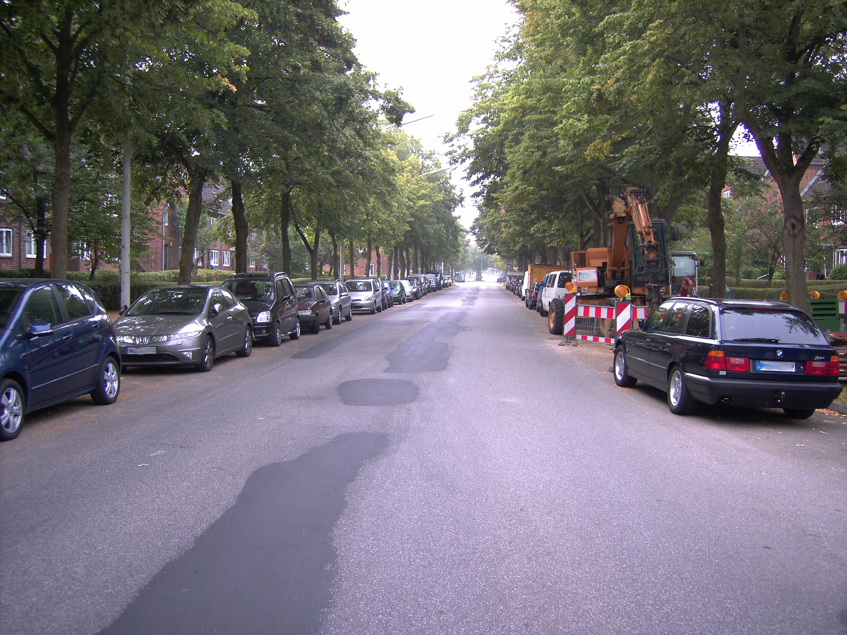 Die Wiener Allee ist die Hauptstraße durch Kiel-Elmschenhagen-Nord.